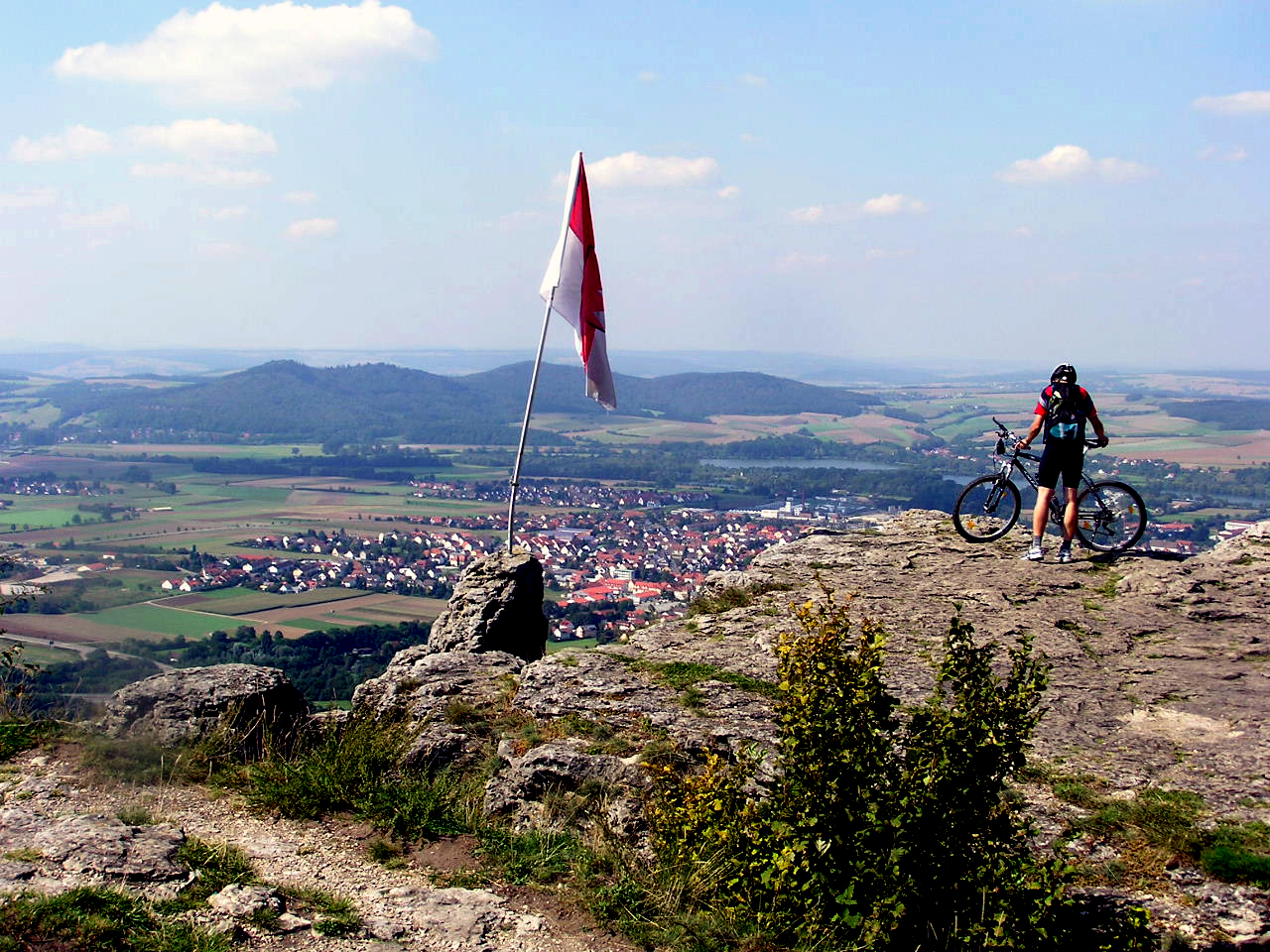 Felsen am Staffelberg mit Blick auf Bad Staffelstein und die Eierberge Source: Selbst fotografiert